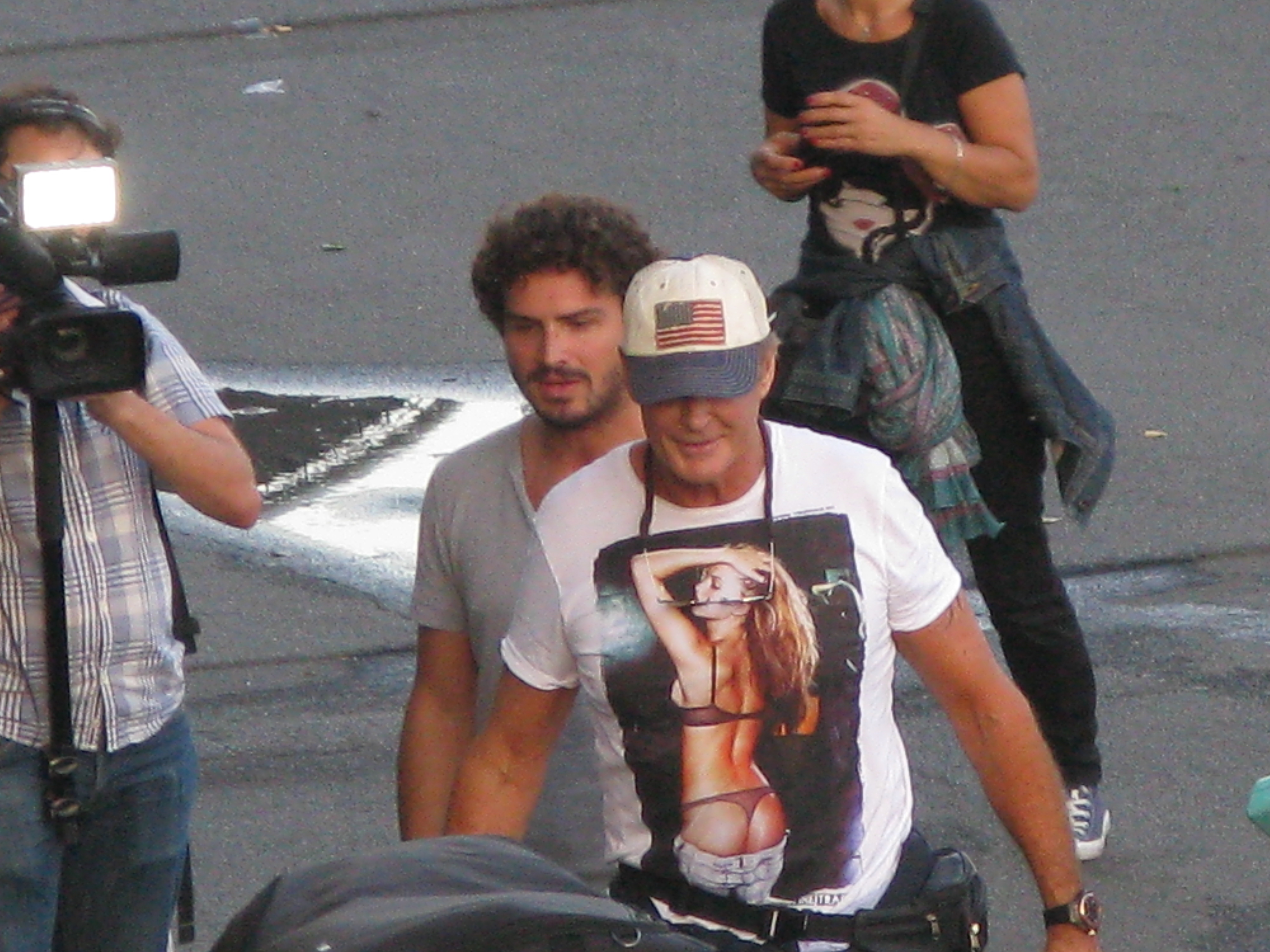 L'acteur David Hasselhoff et le présentateur Maxime Musqua lors du Gumball 3000 à Paris.